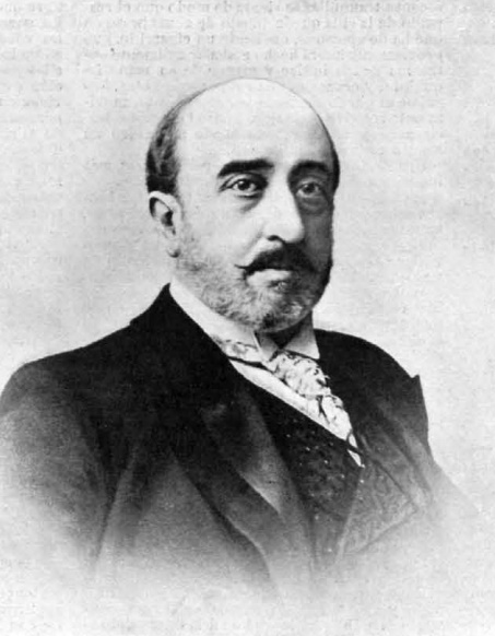 Excmo Sr. D. Emilio Nieto, marqués de Guadalerzas. fotografía de Portela.